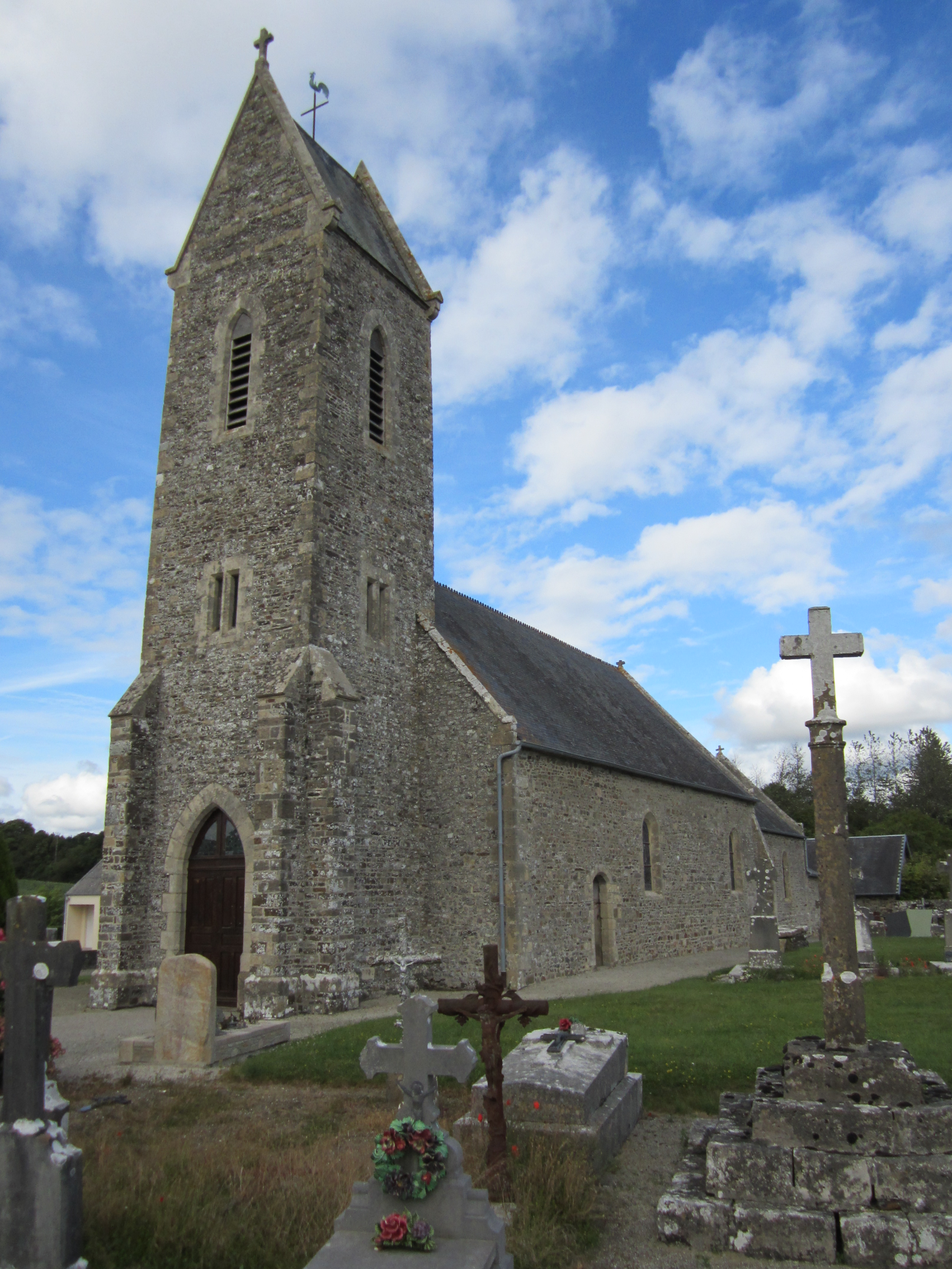 église Sainte Marguerite de Baudreville